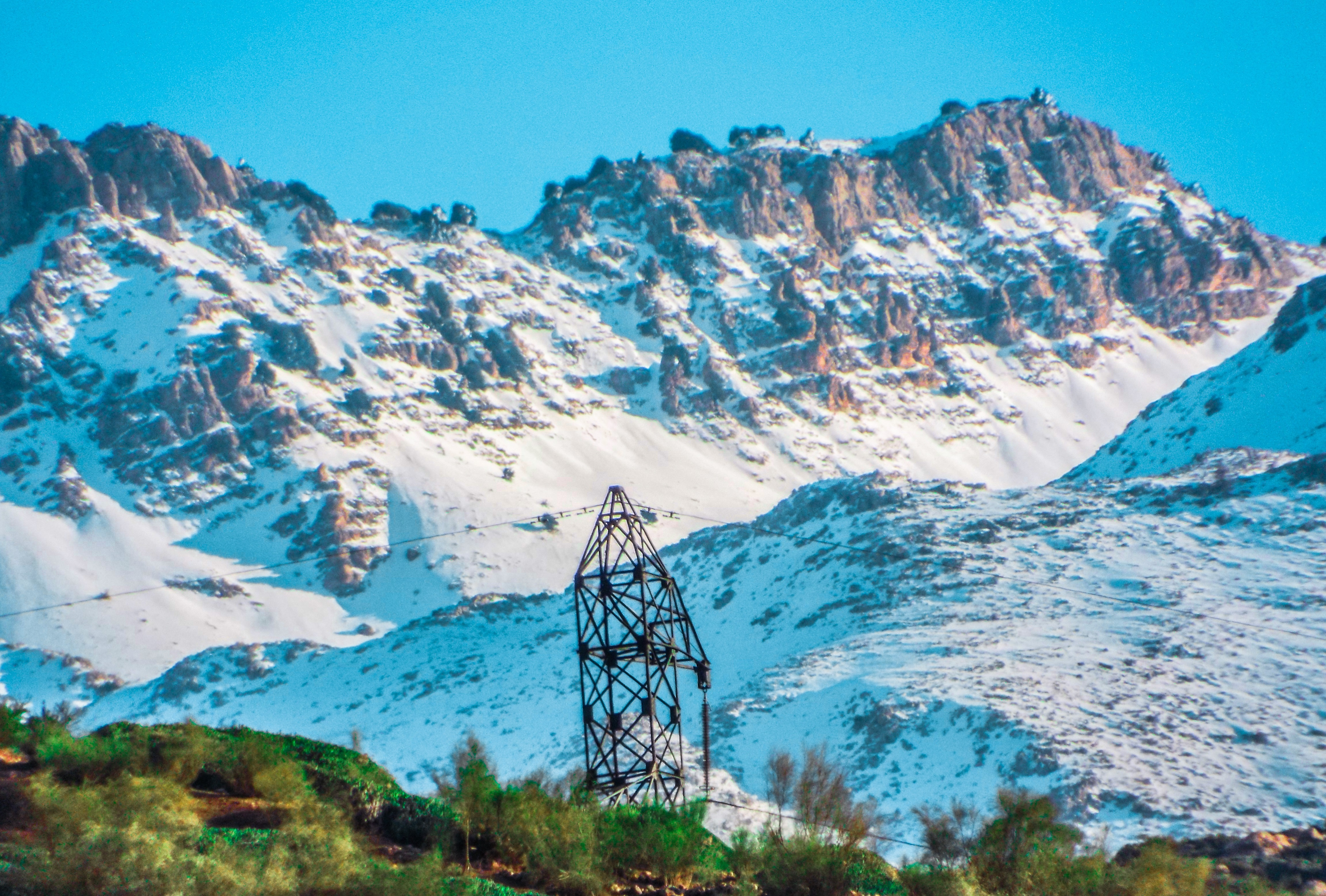 جبل غنيم المطل على مدينة بني ملال